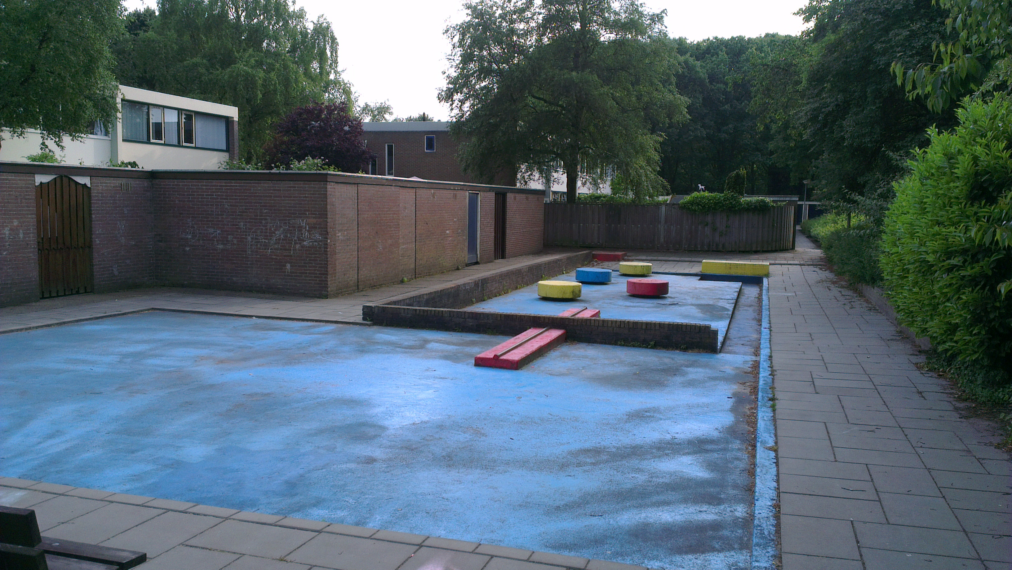 Fonteintjes in de werk Emmerhout.